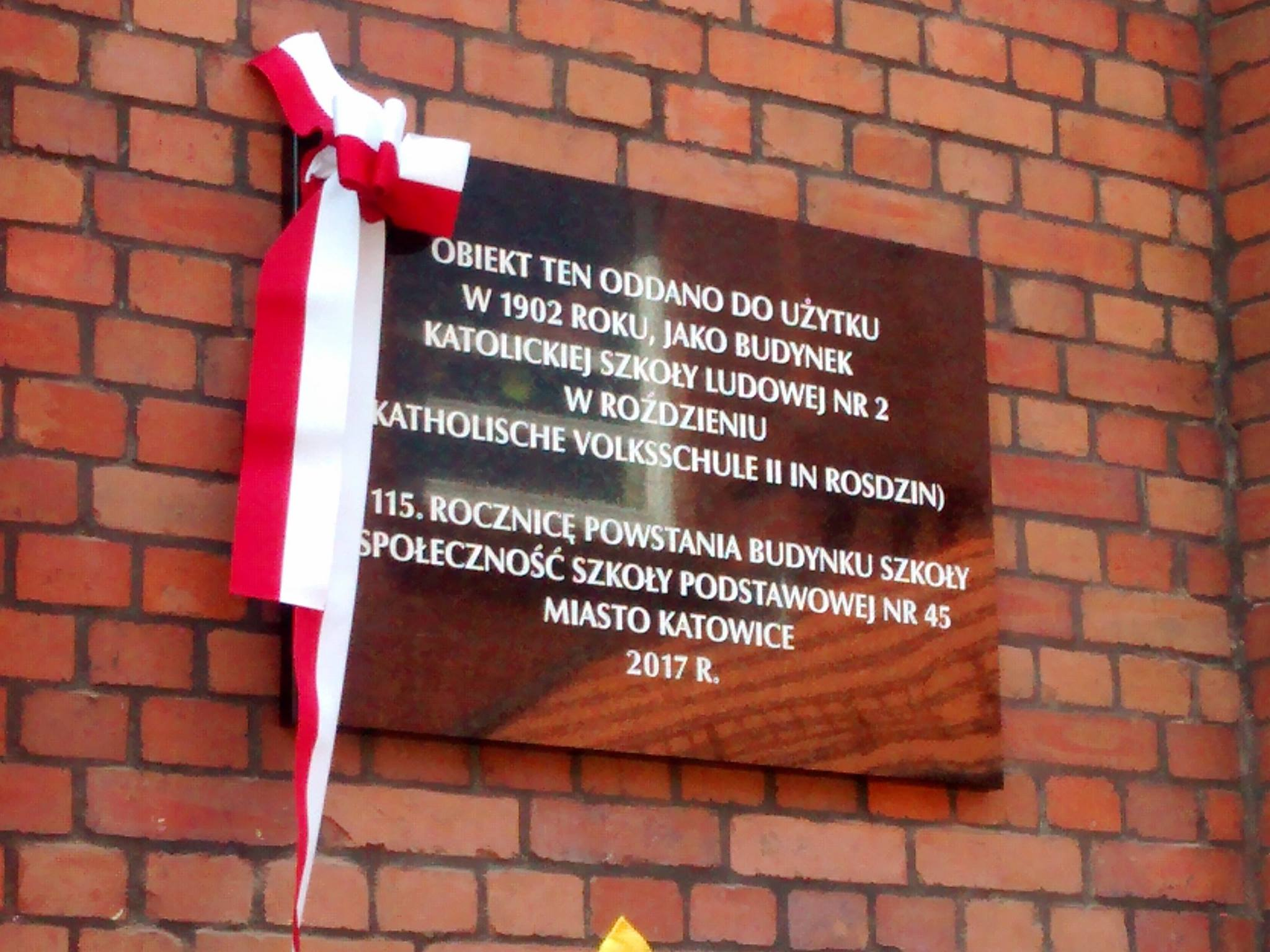 Tablica na fasadzie budynku Szkoły Podstawowej nr 45 im. Kornela Makuszyńskiego przy ul. Janusza Korczaka 11 w Katowicach, odsłonięta 30 maja 2017 roku, w ramach obchodów 115. rocznicy powstania szkoły.